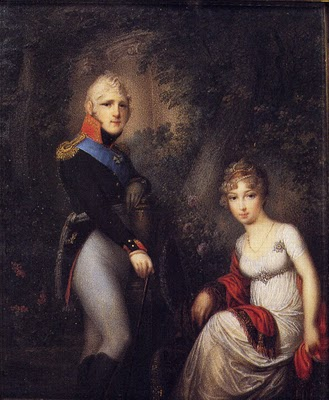 Император Александр I и императрица Елизавета Алексеевна, кисти неизвестного